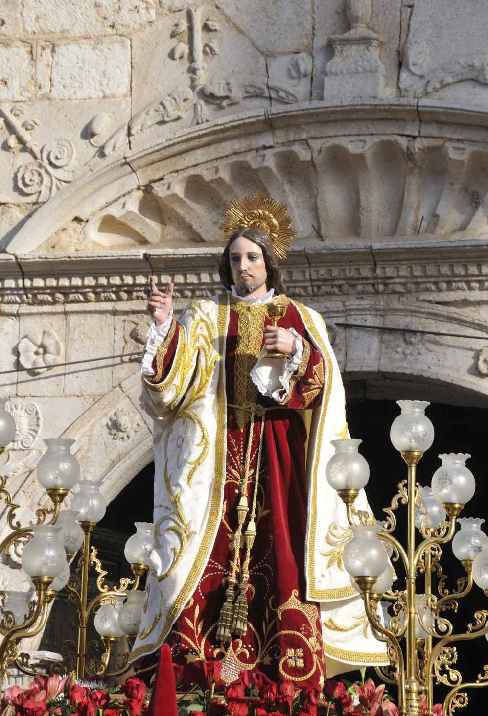 San Juan Evangelista de Ocaña (Toledo)